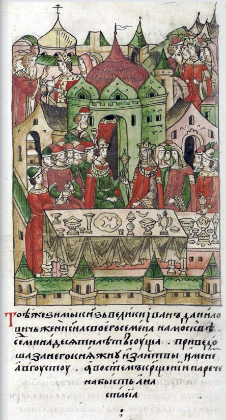 ЛИЦЕВОЙ ЛЕТОПИСНЫЙ СВОД В ту же зиму великий князь Иван Данилович женил в Москве сына своего Семена, которому было семнадцать лет. Для него была приведена из Литвы княжна по имени Августа, а в святом крещении она была наречена Анастасией.